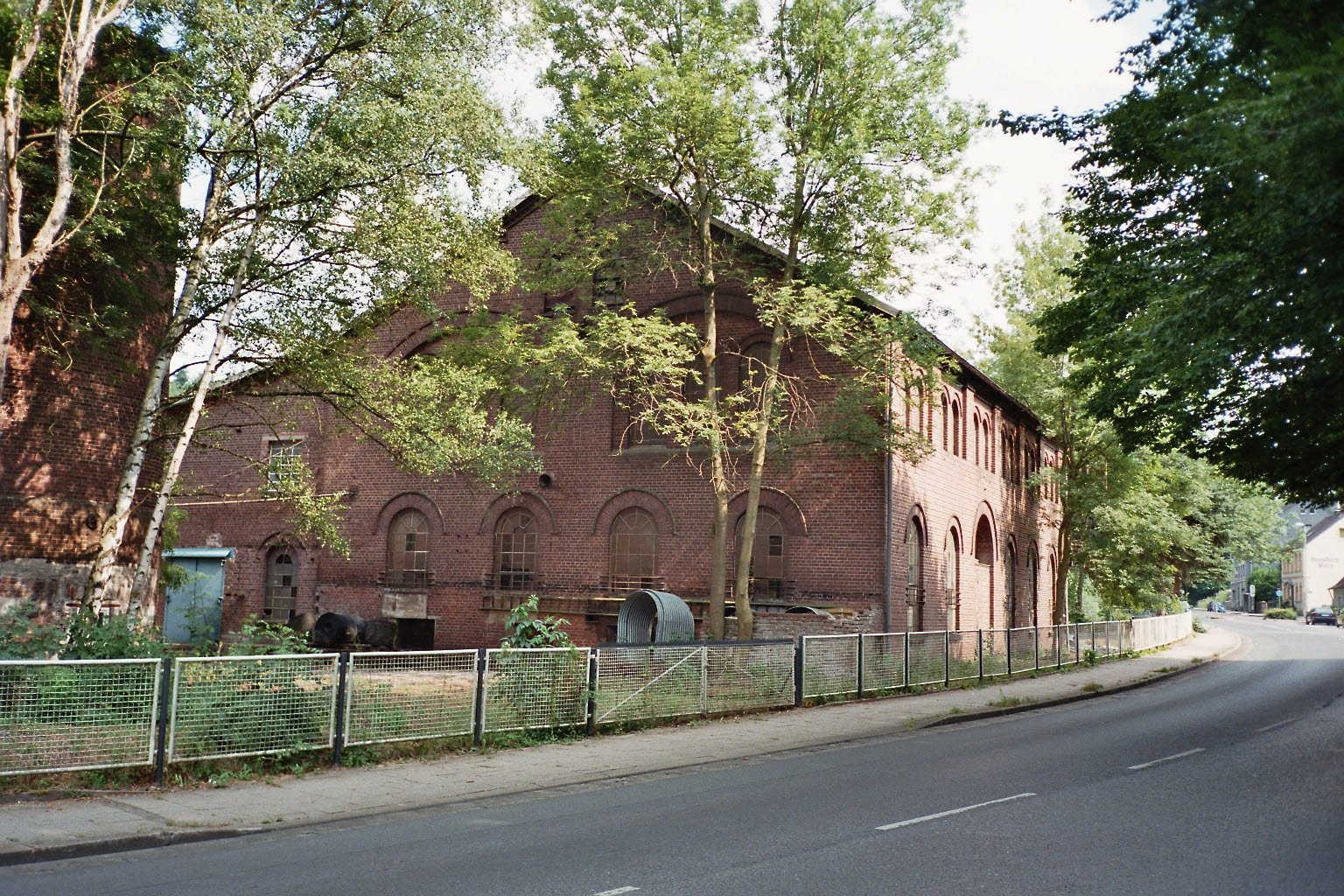 Maschinenhaus der Zeche Blankenburg im Hammertal in Witten-Durchholz